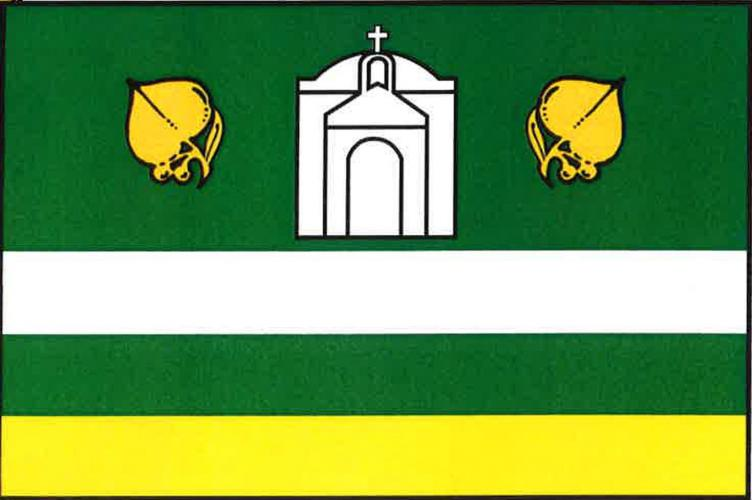 Krchleby, okres Nymburk, vlajka